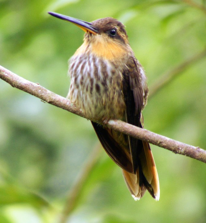 Ramphodon naevius